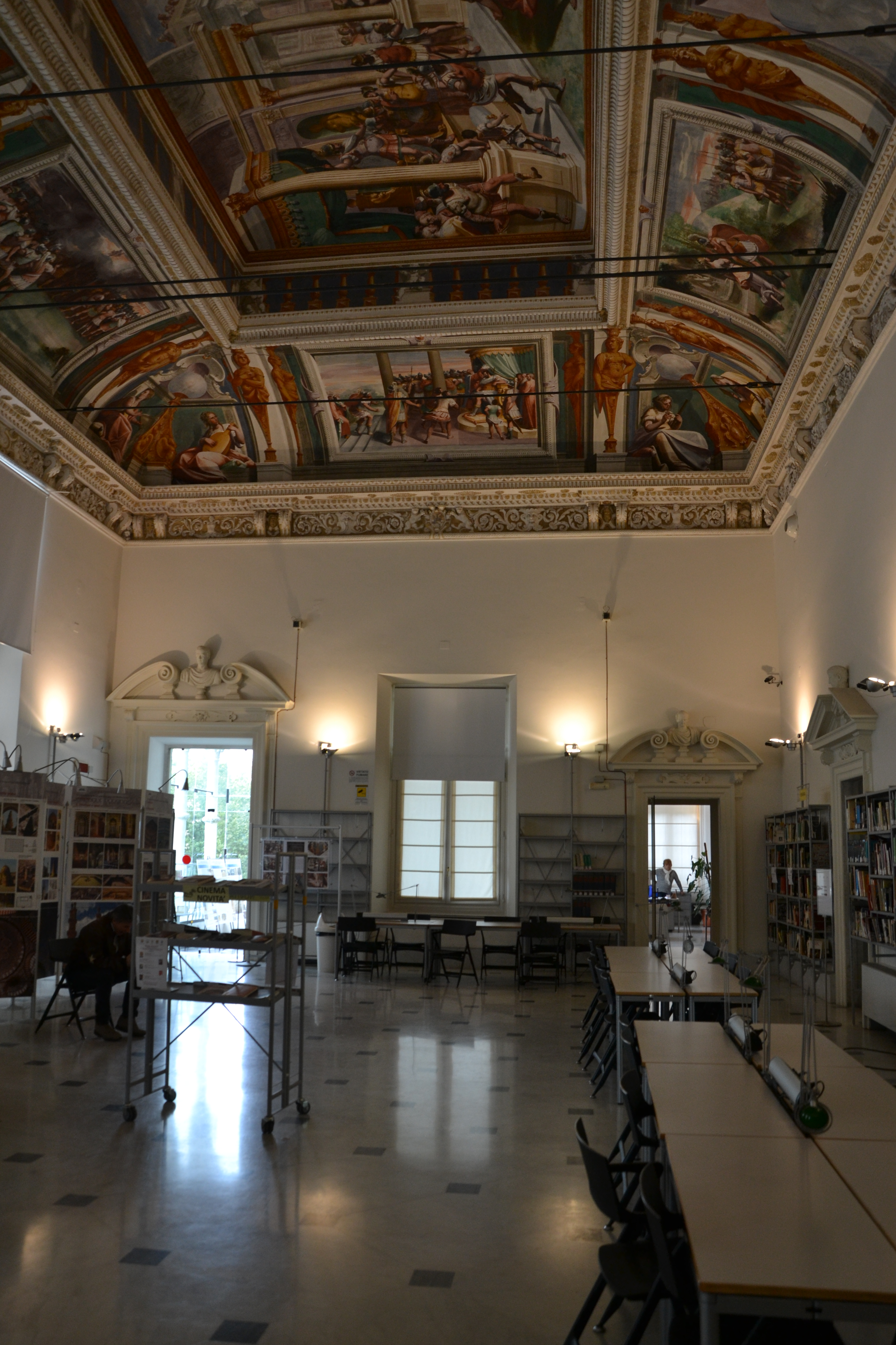 Villa Imperiale di Terralba (Genoa) - “Ratto delle Sabine” del pittore genovese Luca Cambiaso (1527-1585)